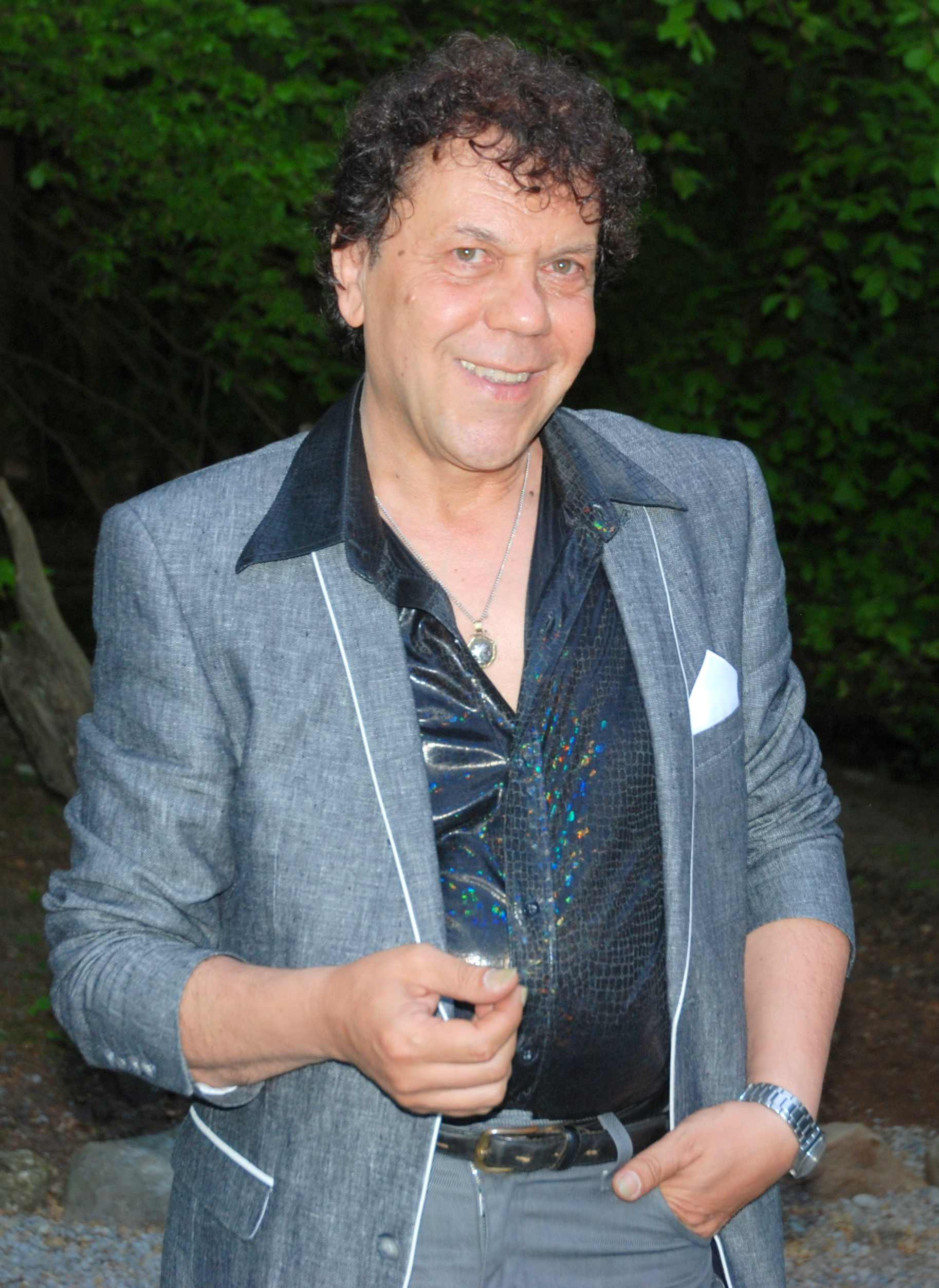 Emmanuel St Laurent Spa 2011